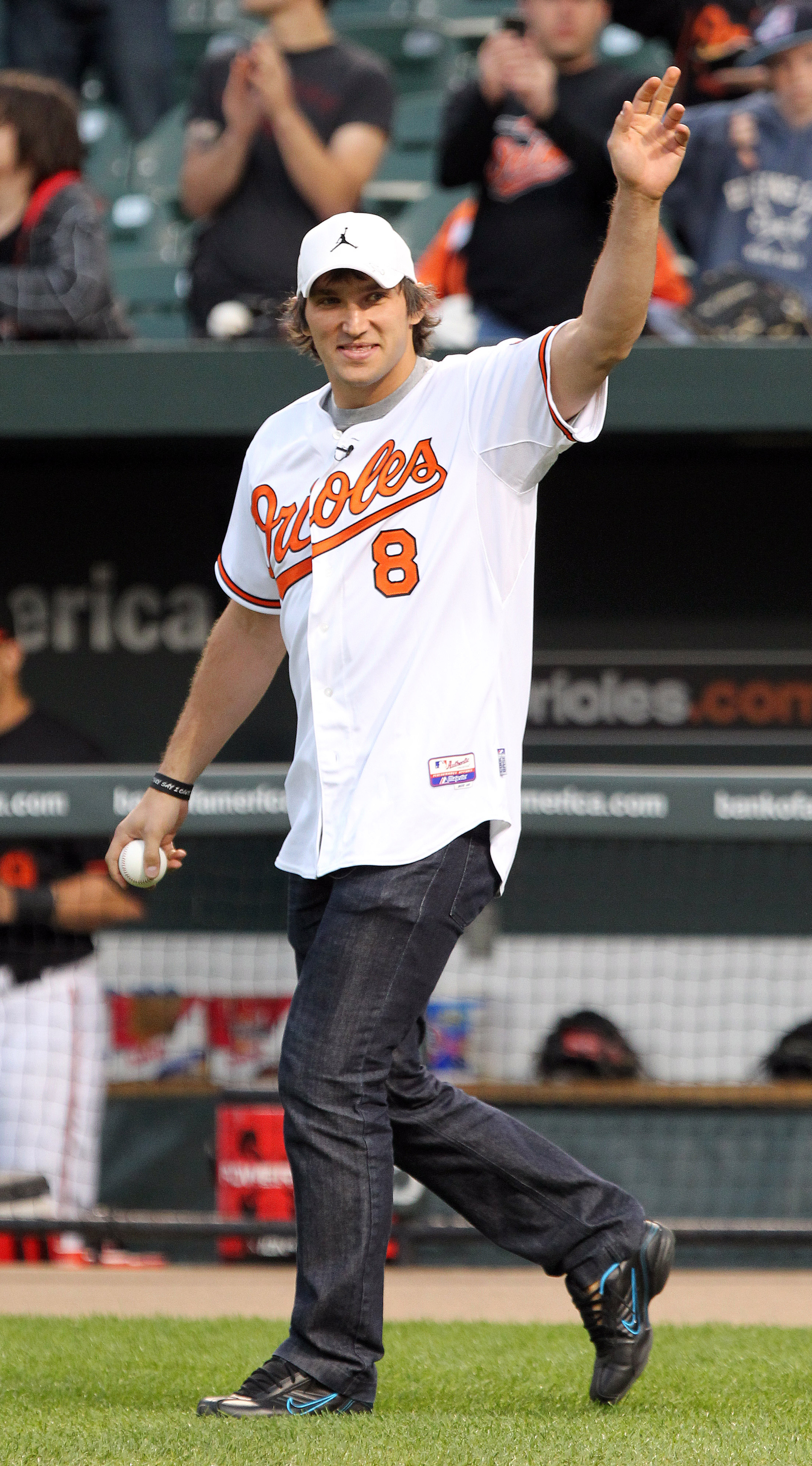 Alexander Ovechkin